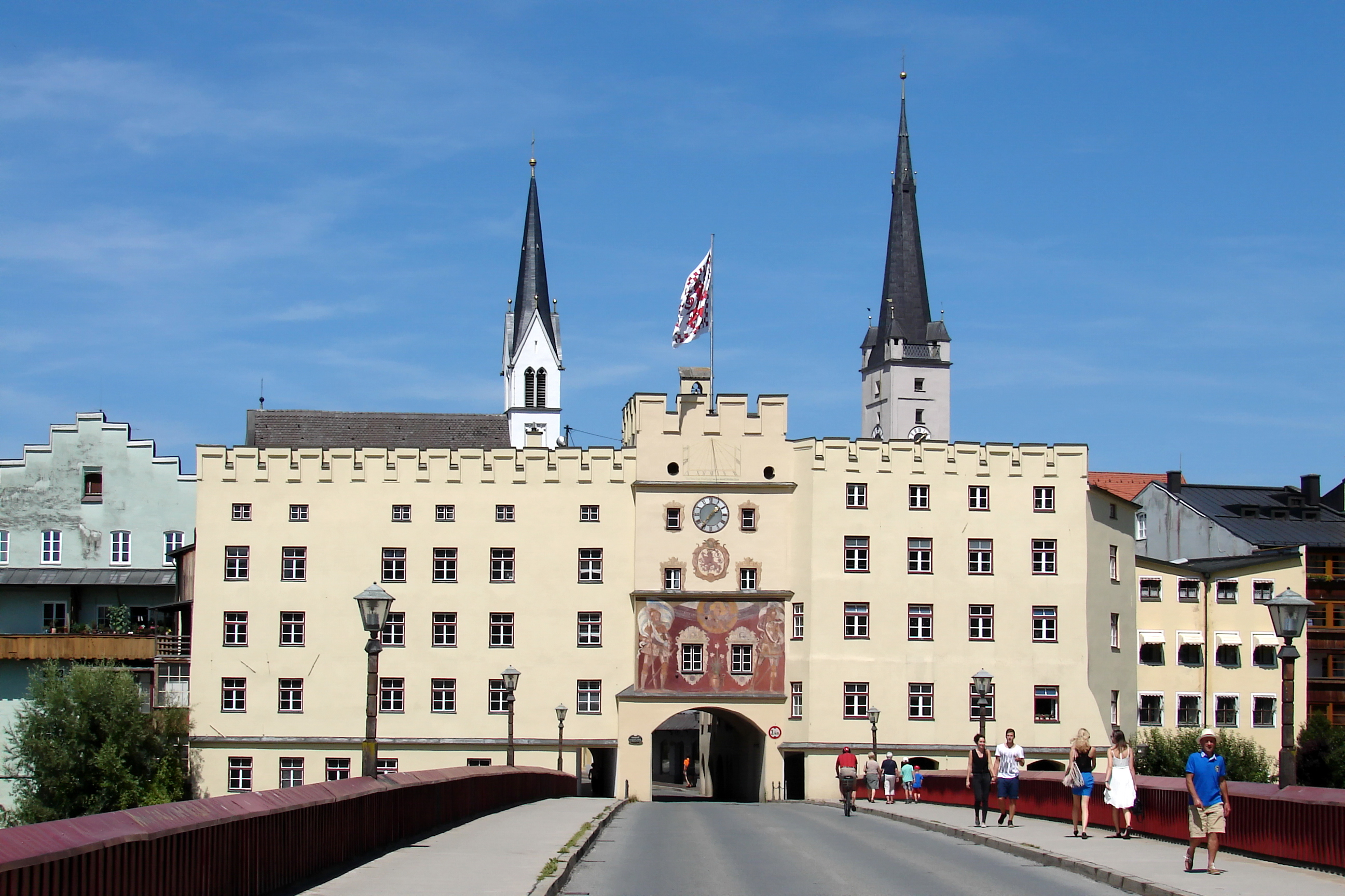 Brucktor (hierdurch führte die ehemalige Salzstraße in die Altstadt, mehrmals umgebaut, die Wandmalerei an der Innfront stammt von 1568)